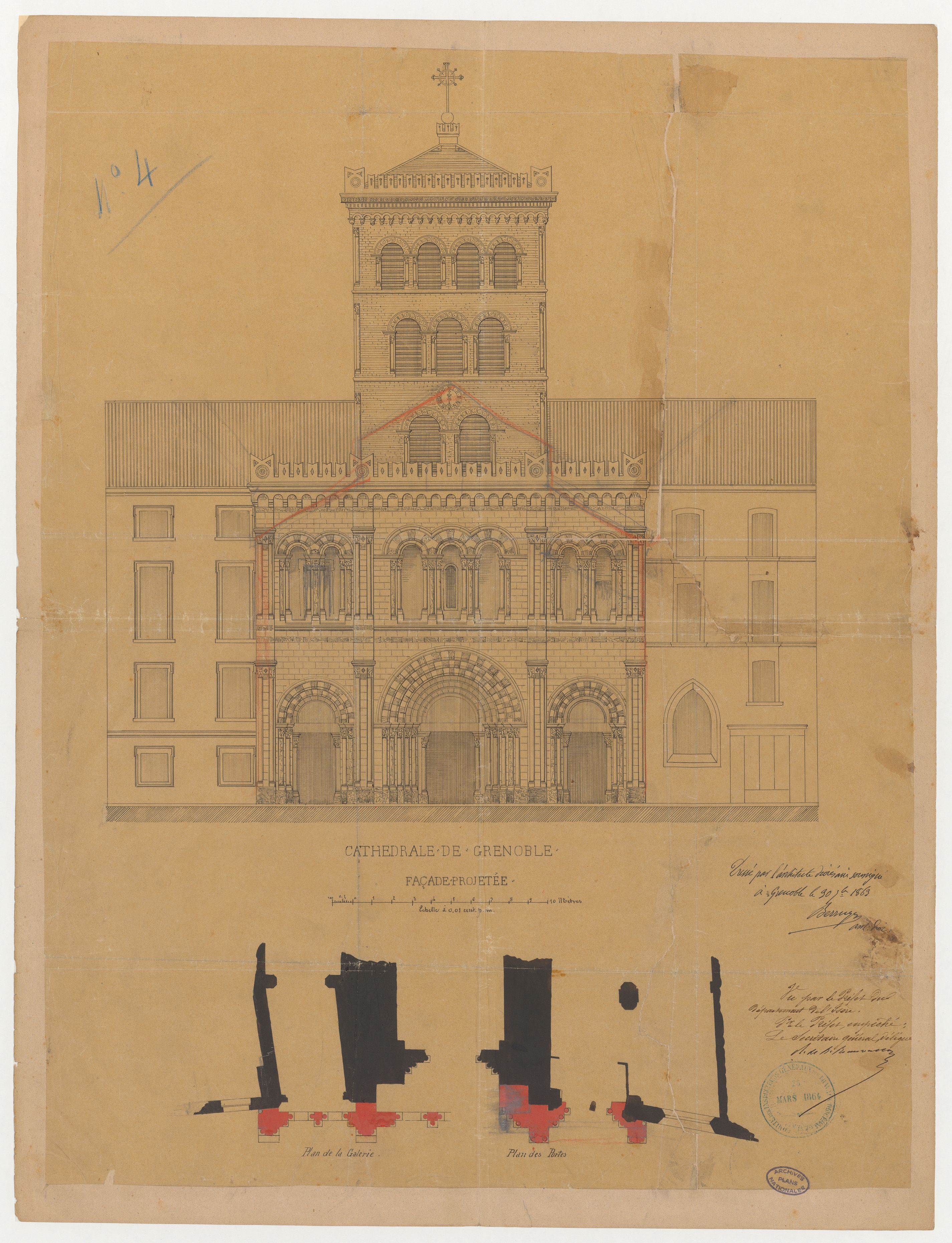 "Cathédrale de Grenoble. Façade projetée". Dessin d'architecture issu des dossiers de travaux de restauration des cathédrales (1802-1912), conservés aux Archives nationales (inventaire et autres documents numérisés consultables en ligne).